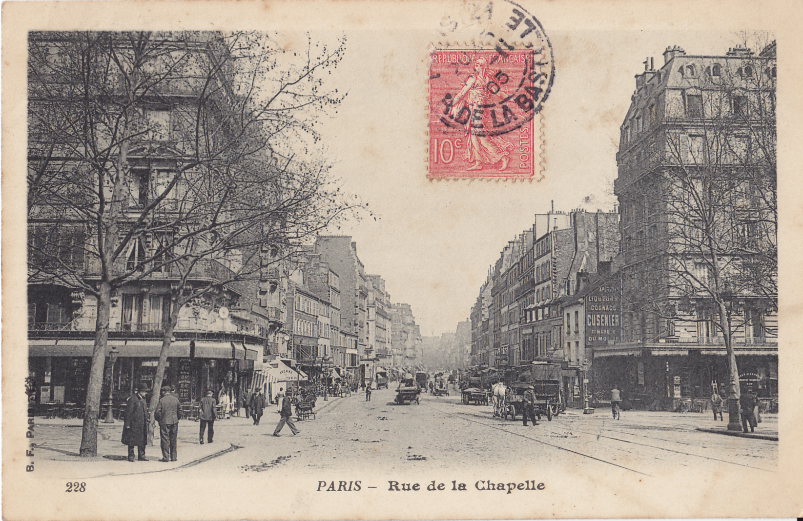 Carte postale ancienne éditée par BF à Paris, n°228 : PARIS - Rue de la Chapelle